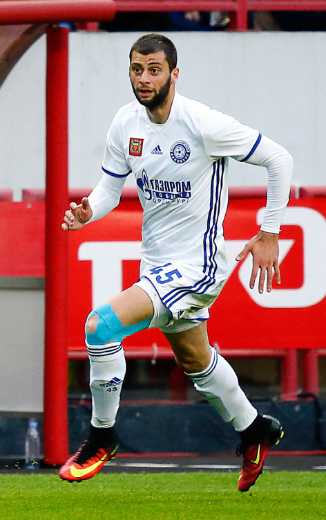 «Локомотив» - «Оренбург»